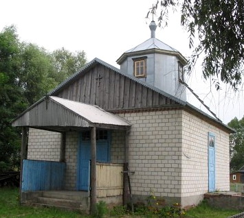 Беларуская (тарашкевіца): Крыжаўзьвіжанская царква ў в. Пагост, Жыткавіцкі раён Гомельскай вобласьці